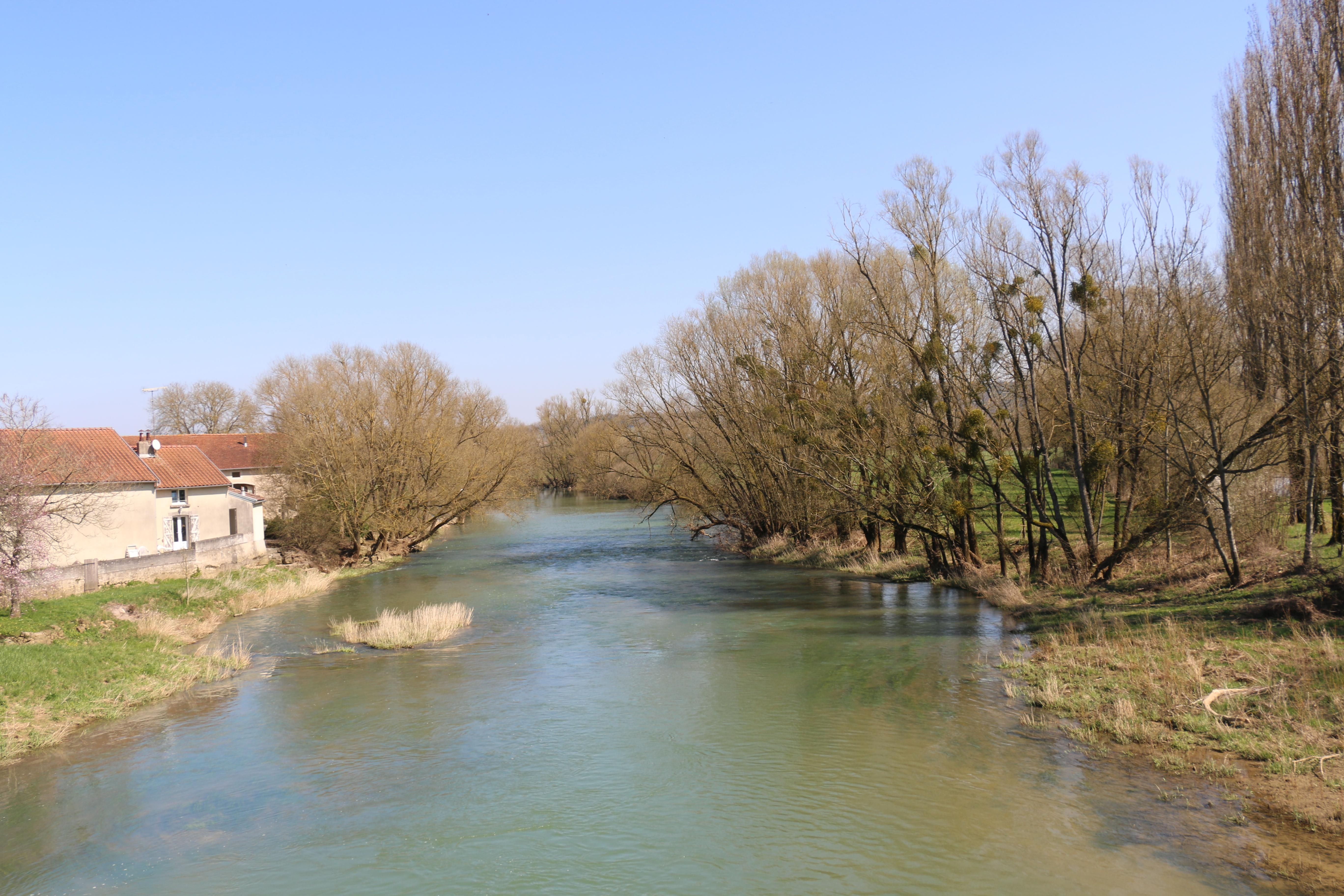 Die Maas bei Domremy.la-Pucelle.